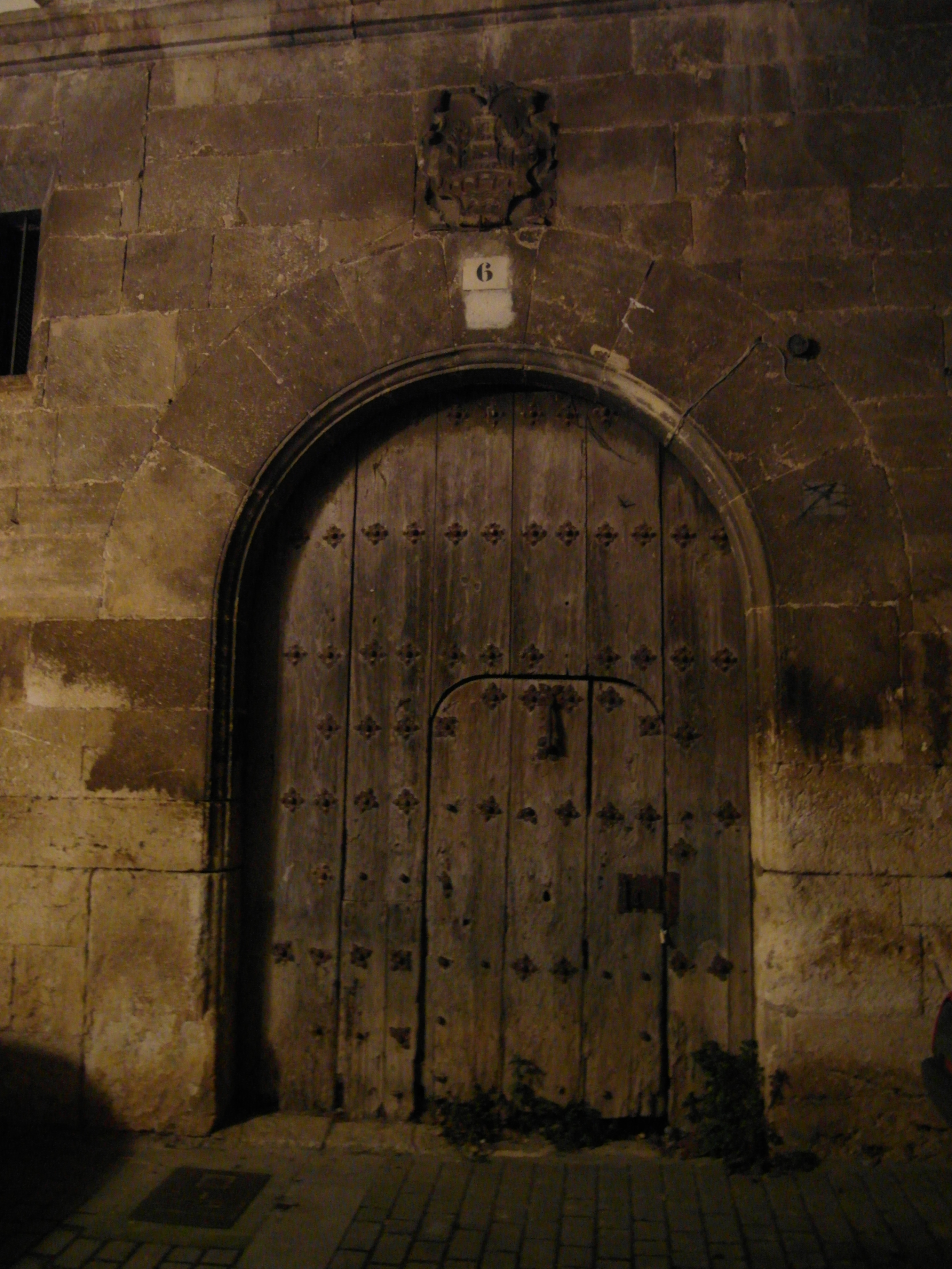 Covarrubias, Burgos.